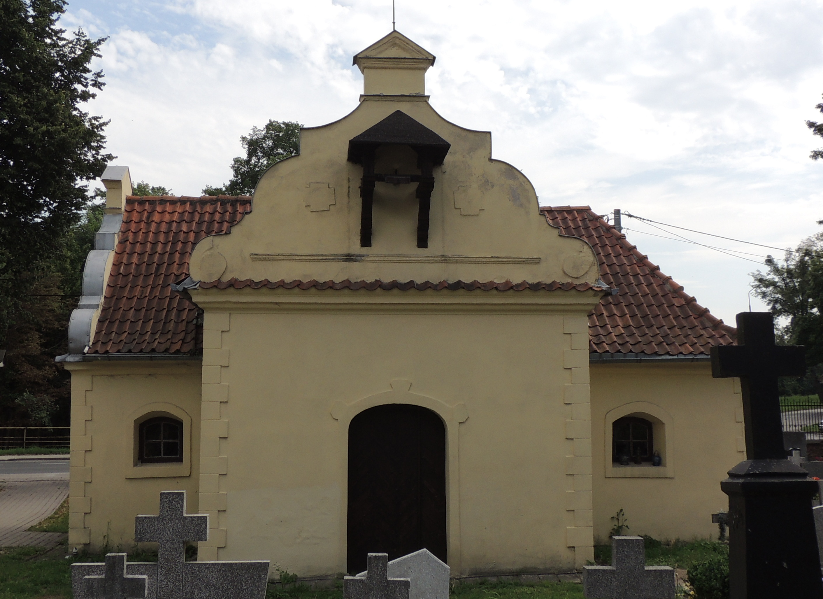 Braniewo, ul. Olsztyńska 2 - kaplica cmentarna p.w. św. Rocha (1711), wraz z cmentarzem